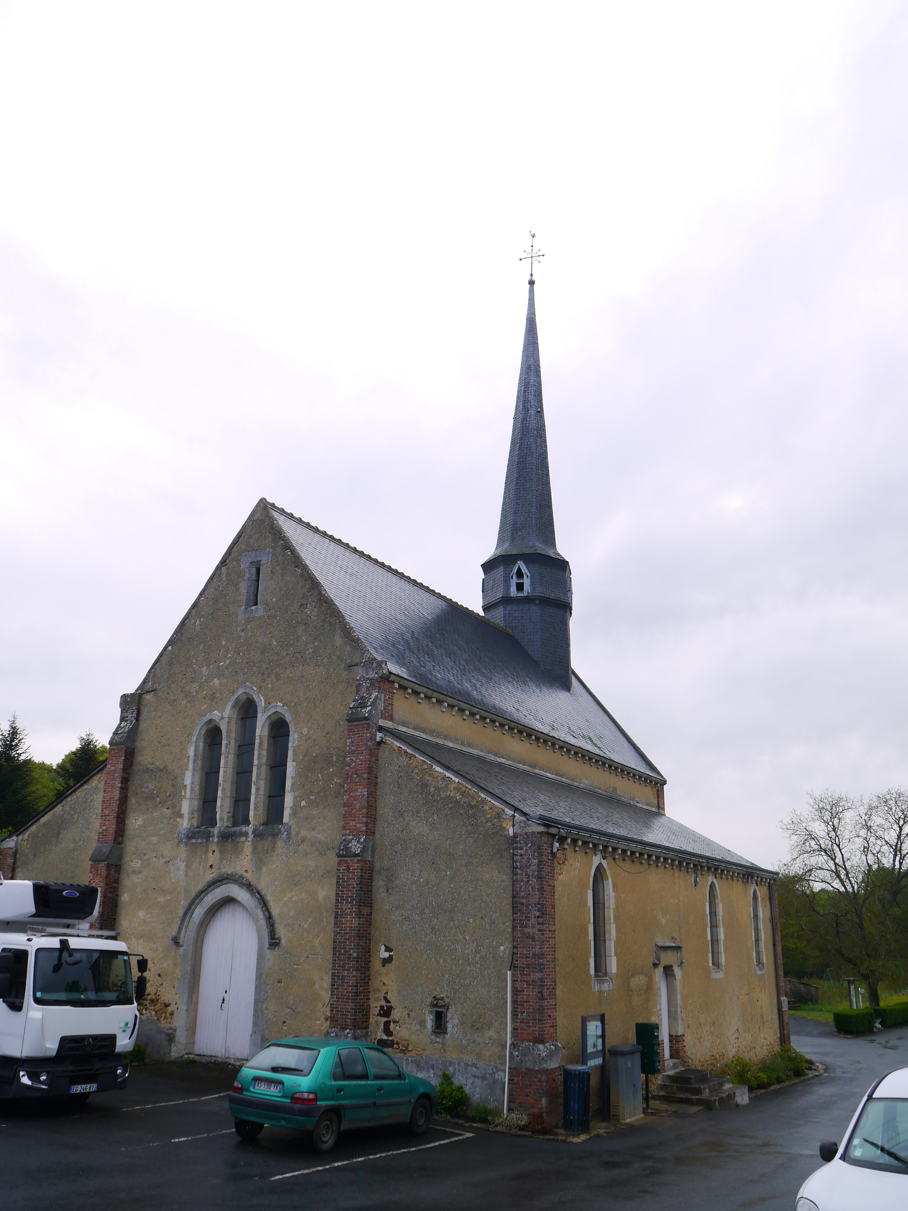 L'église Saint-Pierre.